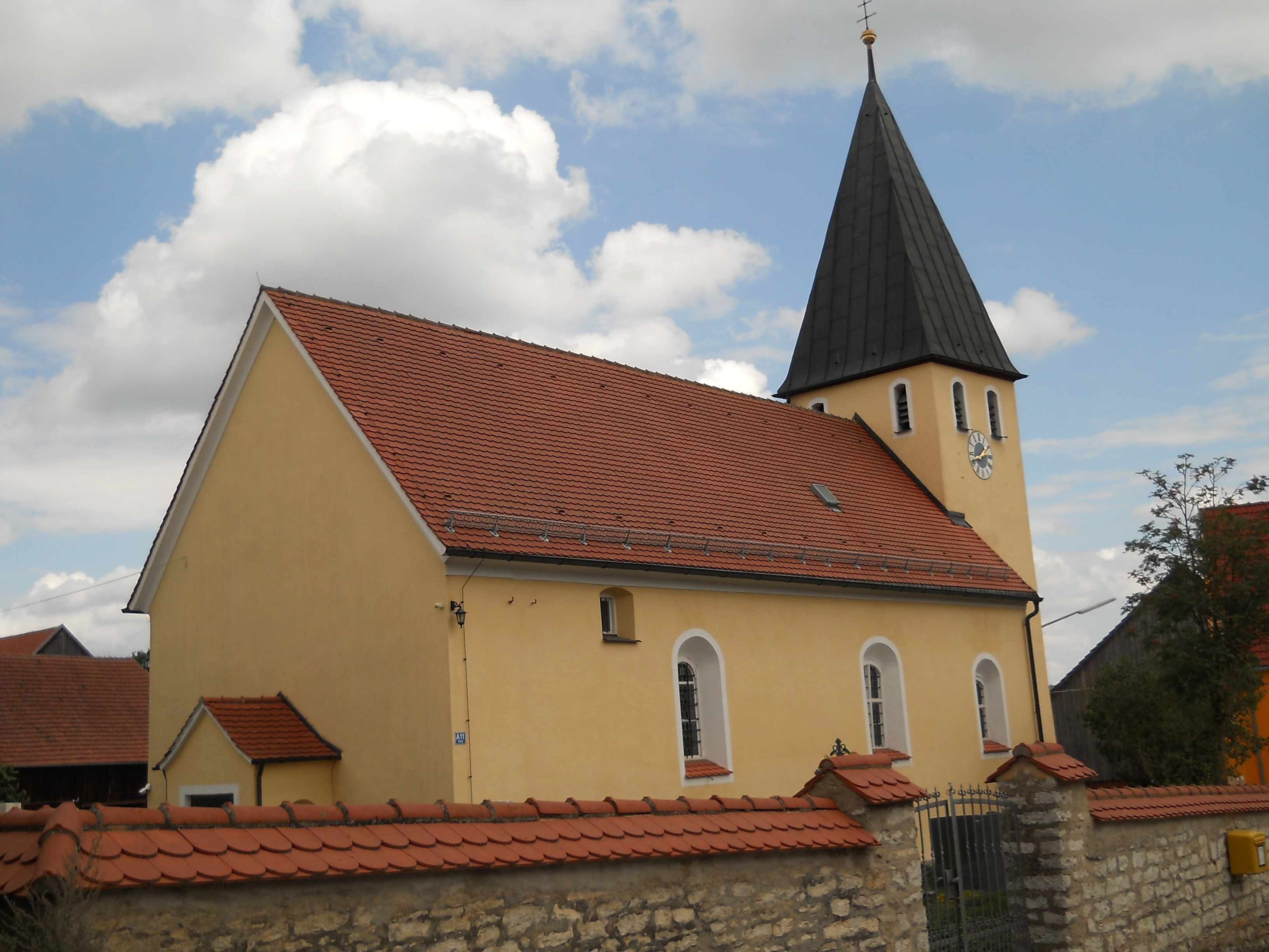 Kirche St. Nikolaus in Oening, Gemeindeteil von Berching im Landkreis Neumarkt in der Oberpfalz